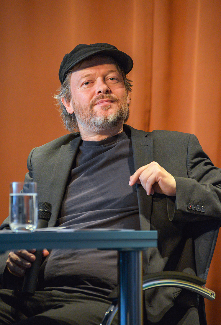 Autorin Rana Ahmad hält Lesung ihres Buches "Frauen dürfen hier nicht träumen" in Oberwesel, Dr. Michael Schmidt-Salomon moderiert Lesung 14. Januar 2018